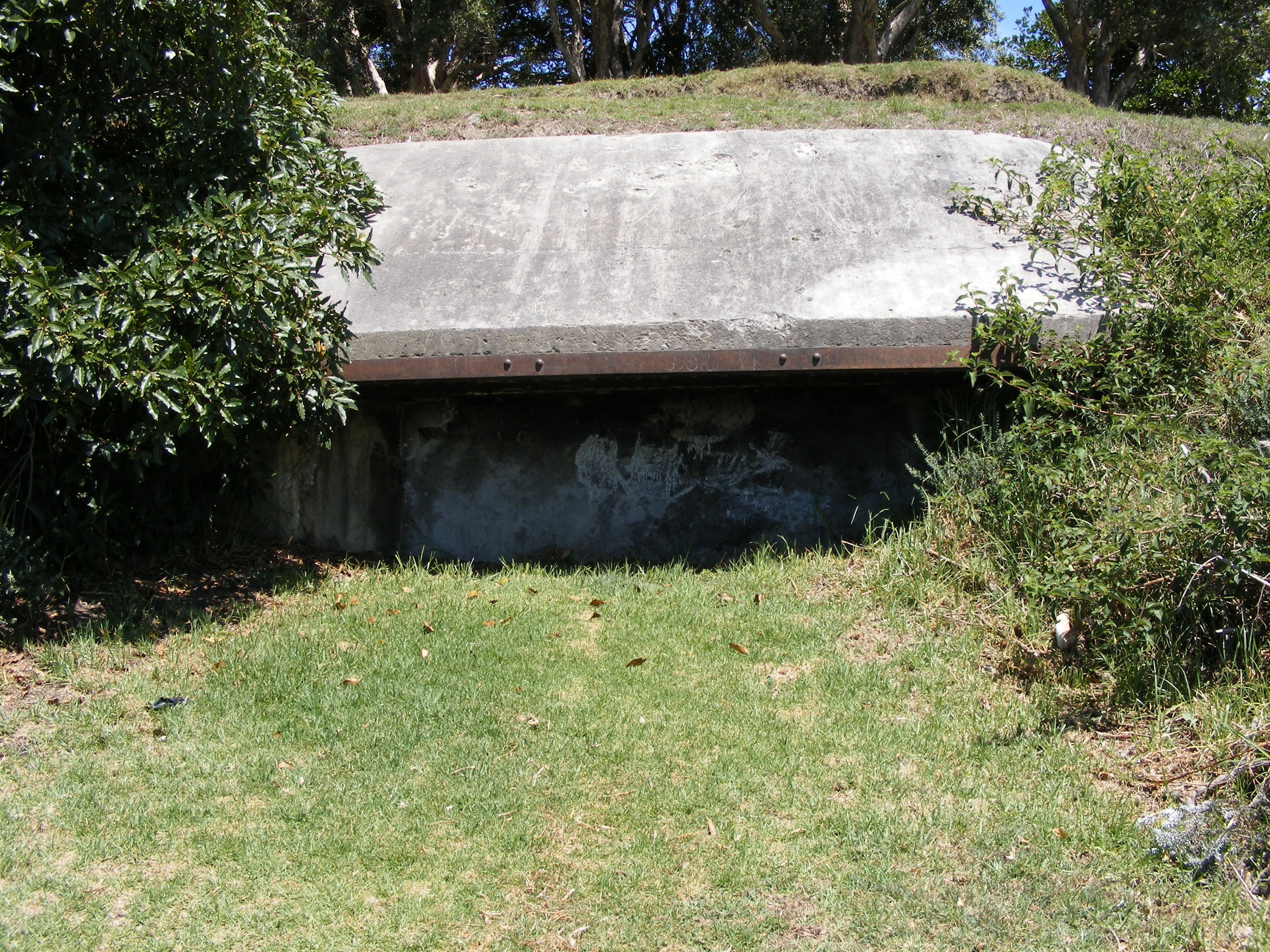 Bunker in Watsons Bay Sydney